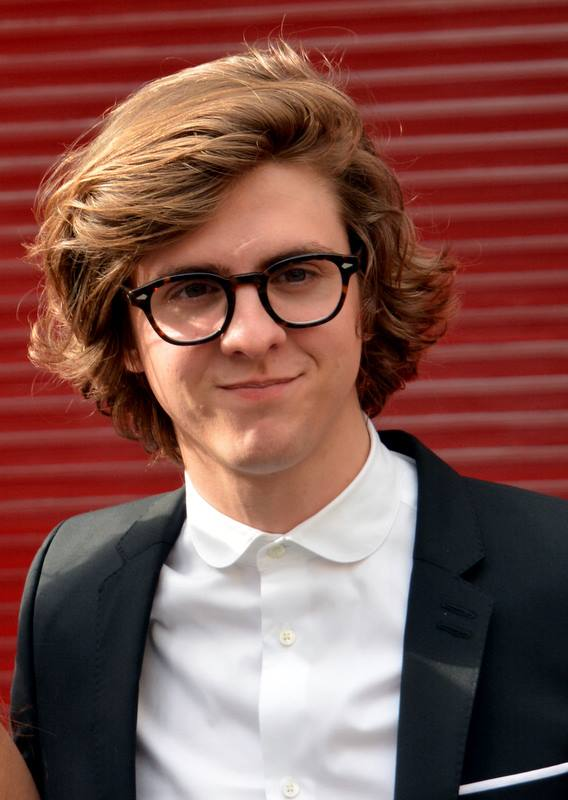 Thomas Solivéres à la cérémonie des Molières